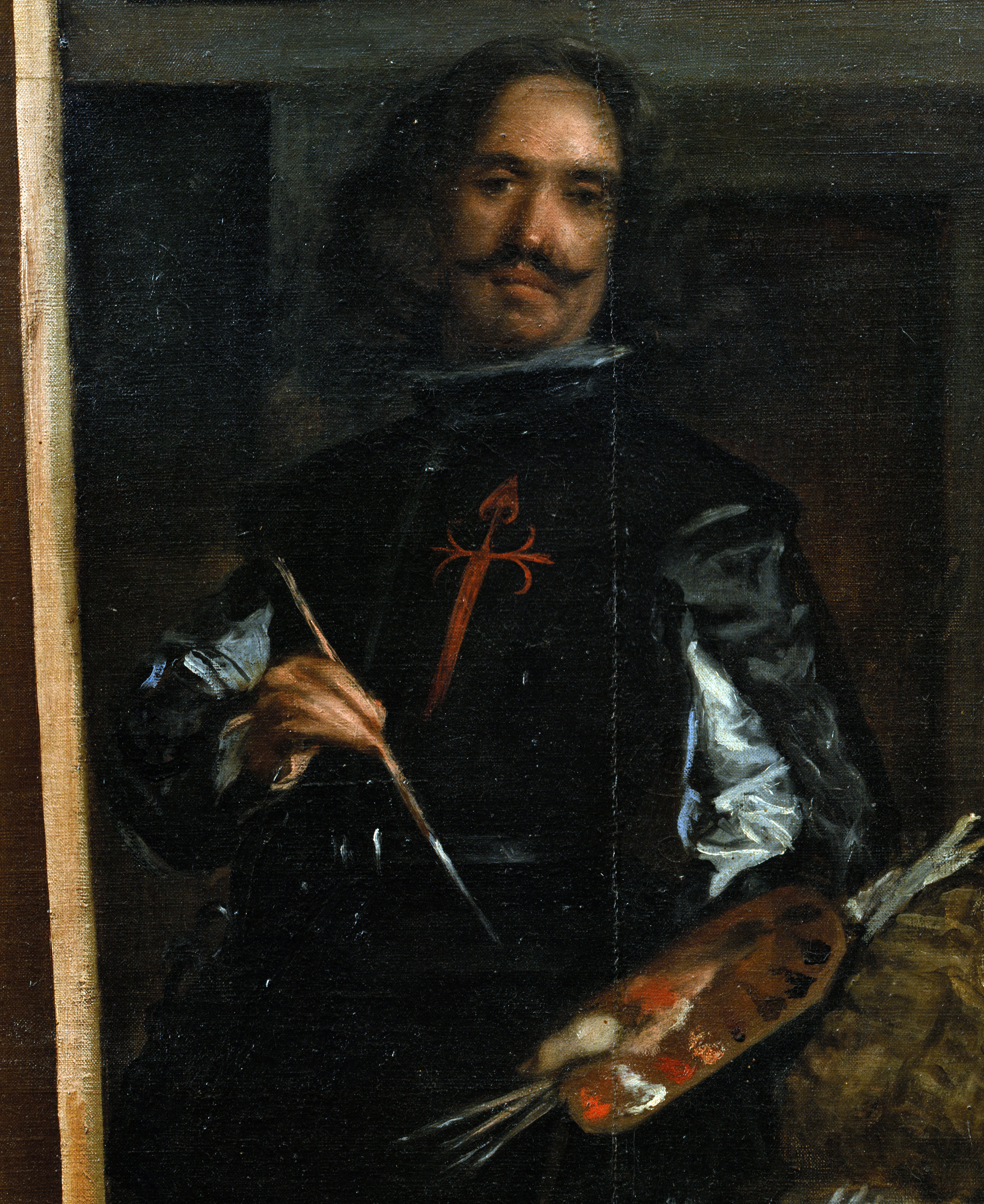 Self-portrait de Velázquez en Las Meninas